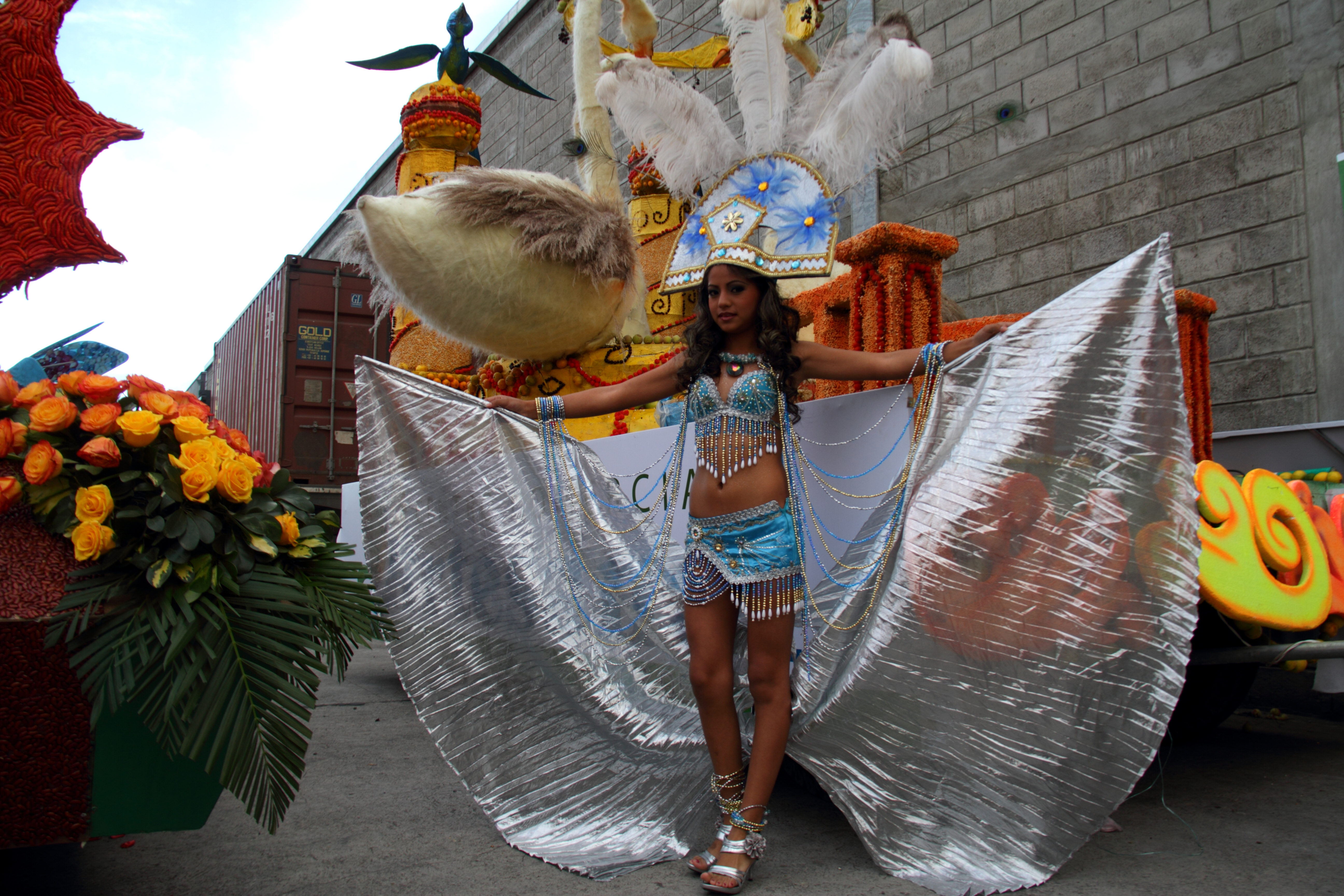 carnaval d'ambate en equateur